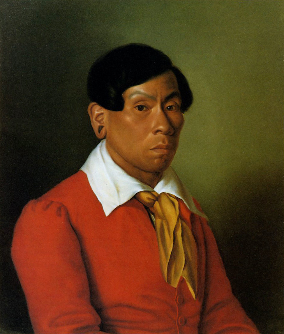 Der Botokude-Indianer Joachim Quäck (Quäck = portugiesisch: Kuêk, ursprünglich: Nuguäck) (* vermutlich um 1800 im brasilianischen Bundesstaat Minas Gerais in Brasilien; † 1. Juni 1834 in Neuwied) traf 1817 als Minderjähriger den deutschen Entdecker, Ethnologen, Zoologen und Naturforscher Prinz Maximilian zu Wied-Neuwied in Brasilien. Quäck wurde für Maximilian zum einheimischen Reisebegleiter, der ihm das für seine Forschungen notwendige Hintergrundwissen vermittelte. Maximilian ließ ihn nach Europa nachkommen. Am 12. Februar 1818 kam Quäck in Neuwied an. Dort arbeitete er für Maximilian als dessen persönlicher Kammerdiener. Quäck verstarb im Alter von 34 Jahren am 1. Juni 1834 um 9 Uhr morgens an einer Leberentzündung und wurde am 3. Juni 1834 (vermutlich auf dem Alten Friedhof von Neuwied) katholisch beerdigt.